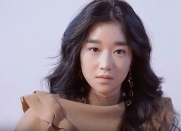 2017년의 시작과 동시에 배우 서예지가 활짝 폈다.